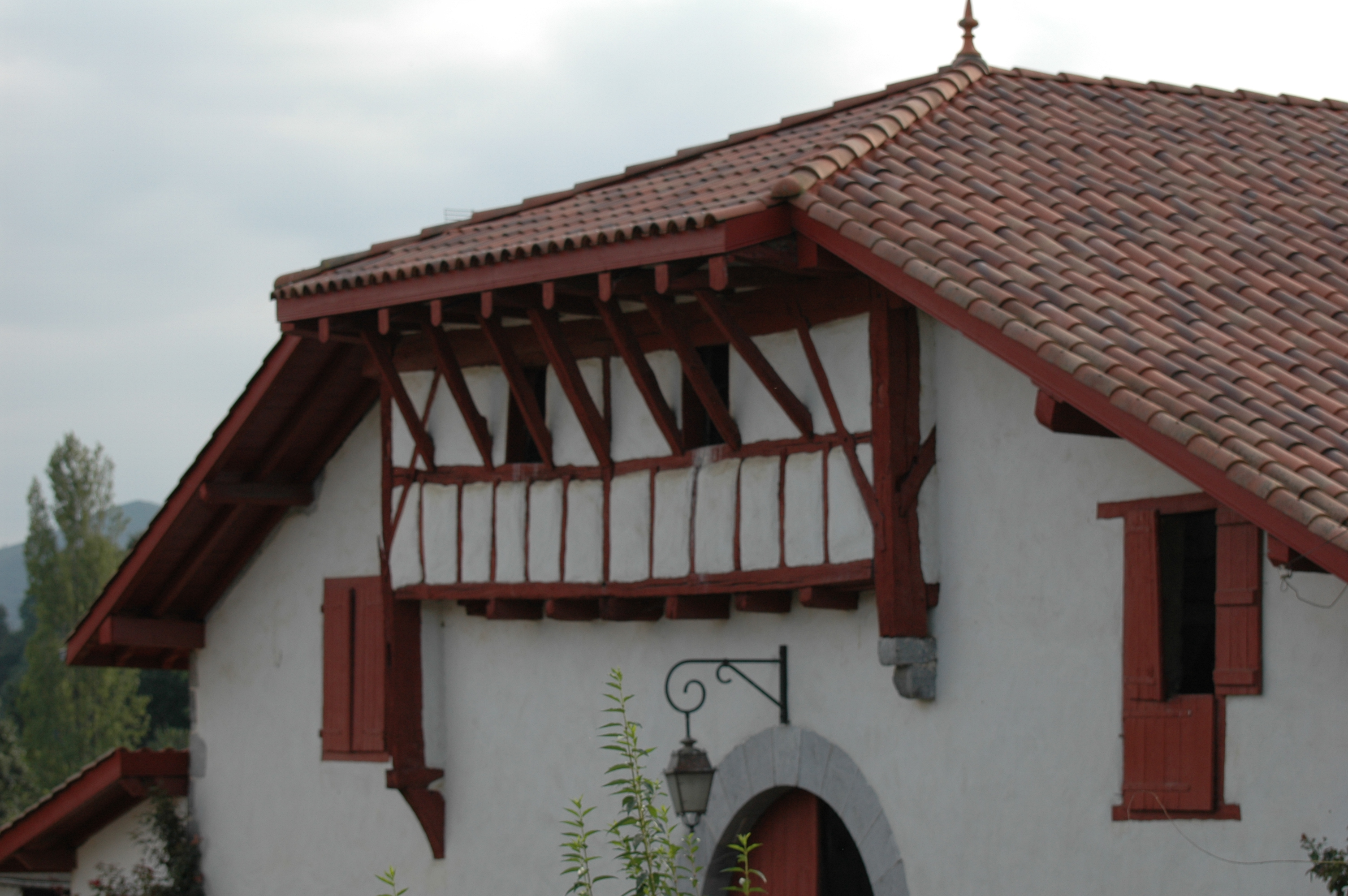 Saint-Martin-d'Arberoue, maison ancienne